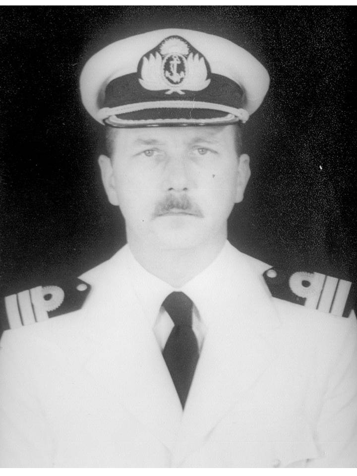 Capitan de Fragata Don Julio M. PEREZ